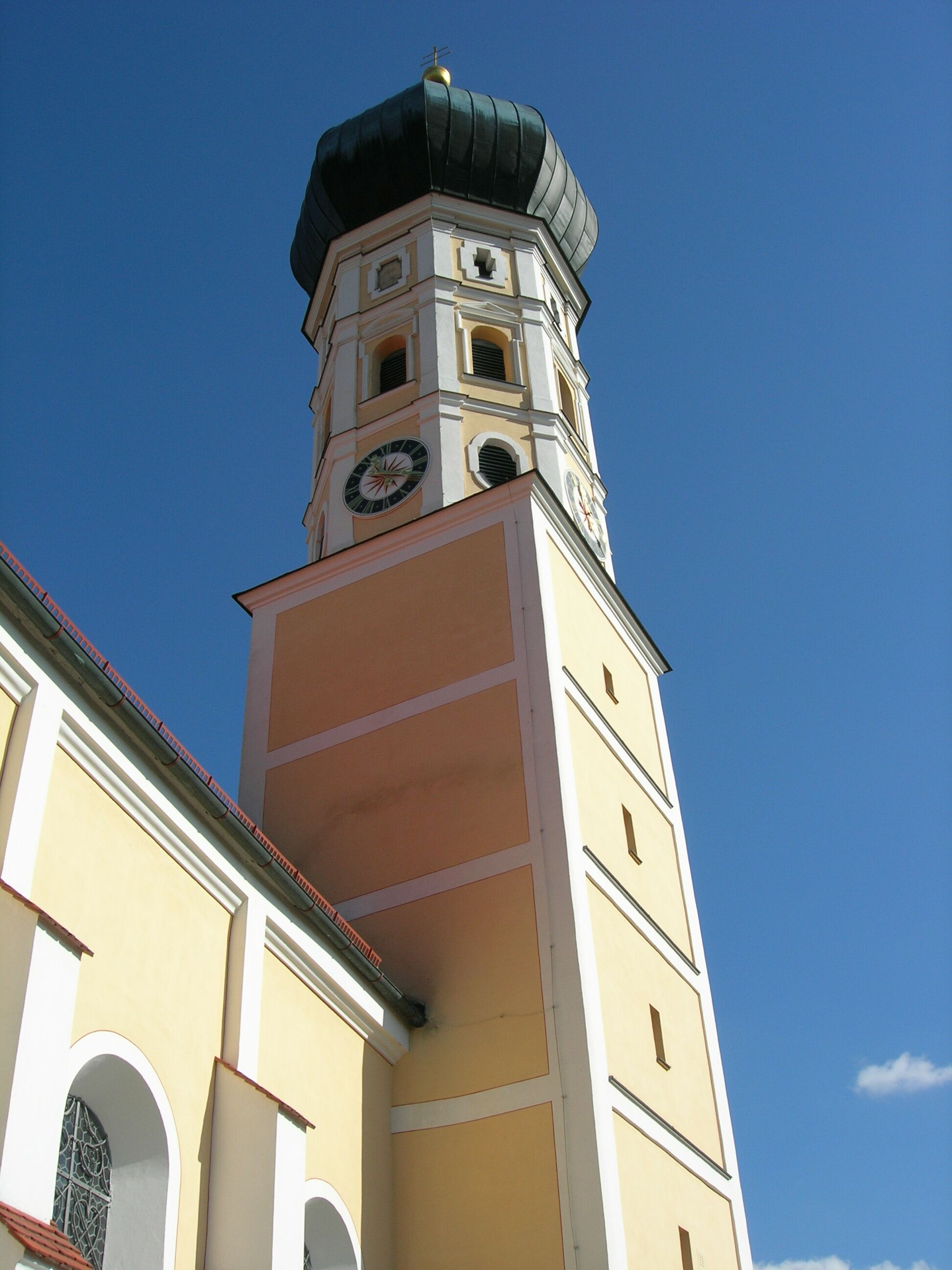 katholische Pfarrkirche Mariä Himmelfahrt in Walleshausen